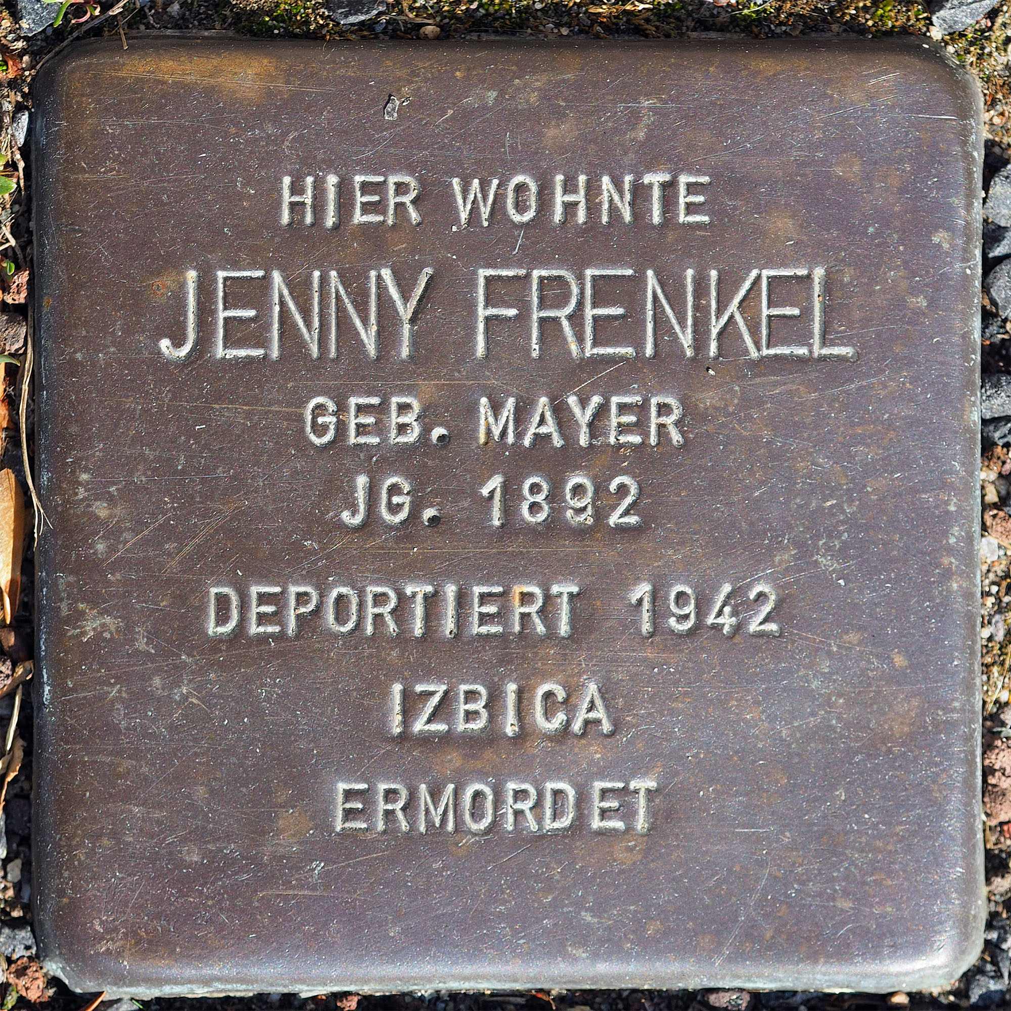 Stolpersteine MG: Frenkel, Jenny